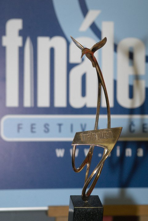 Hlavní cena festivalu Finale Plzen - Zlaty lednacek